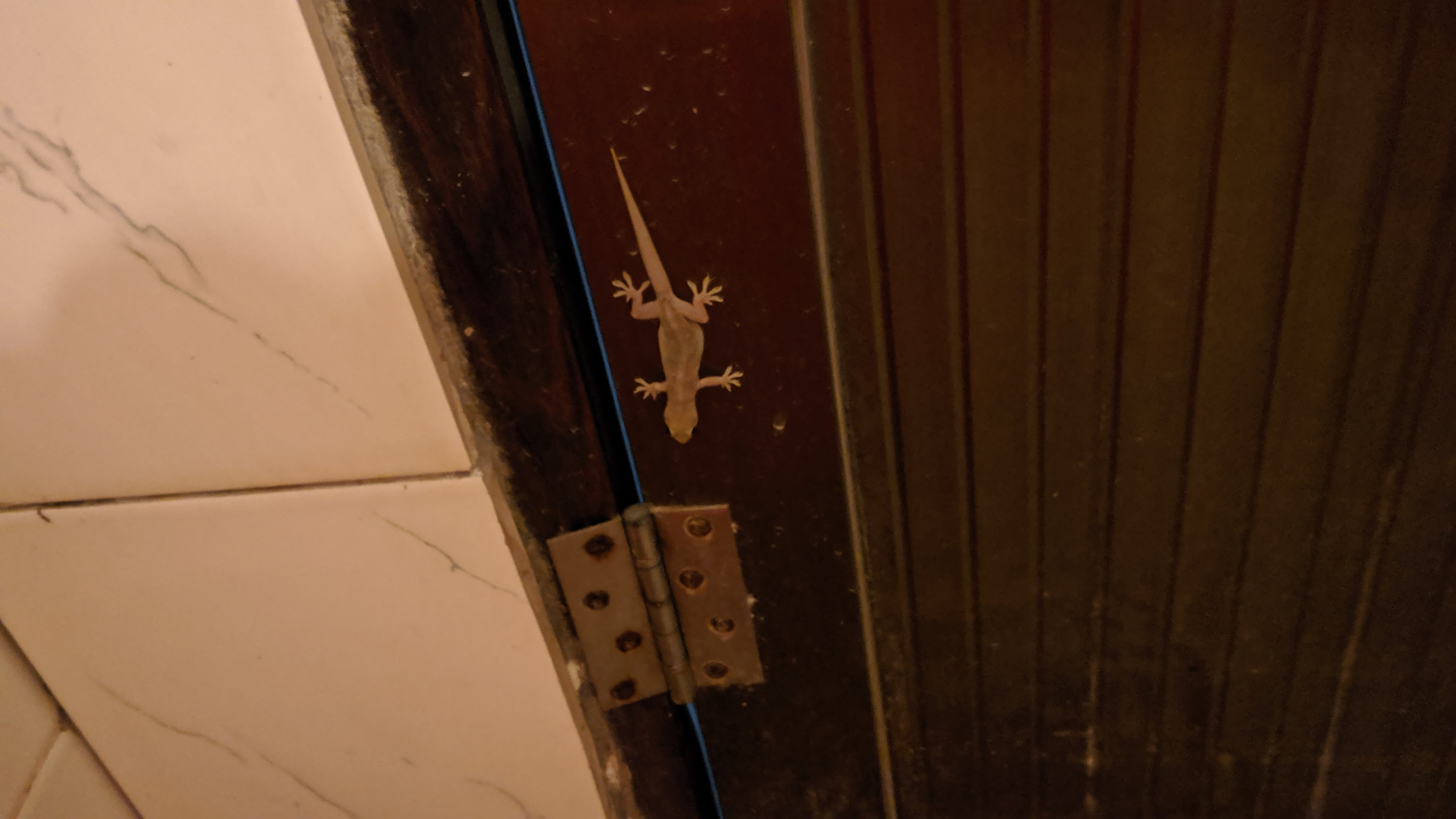 一种在中国南方常见的壁虎